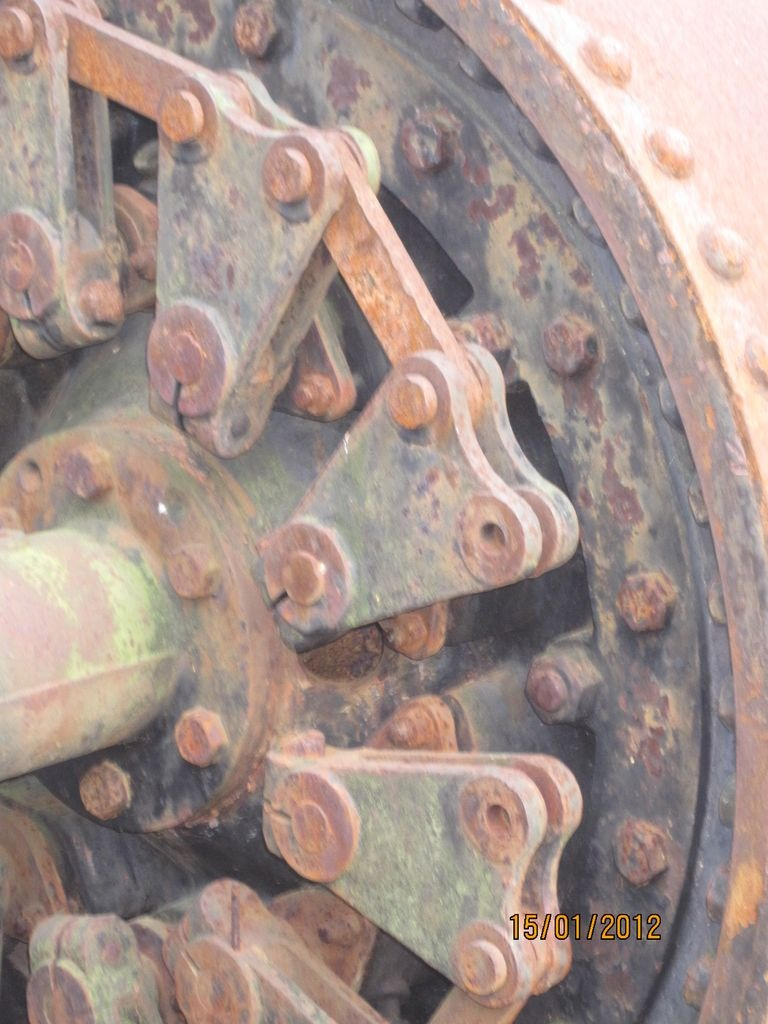 Detalje fra Lillesand første elektrisitetsverk - Kulturminne 2012